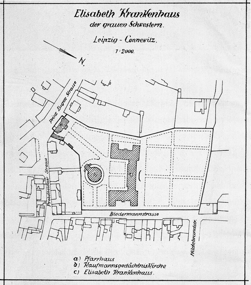 Lageplan des St. Elisabeth-Krankenhauses Leipzig (1931)